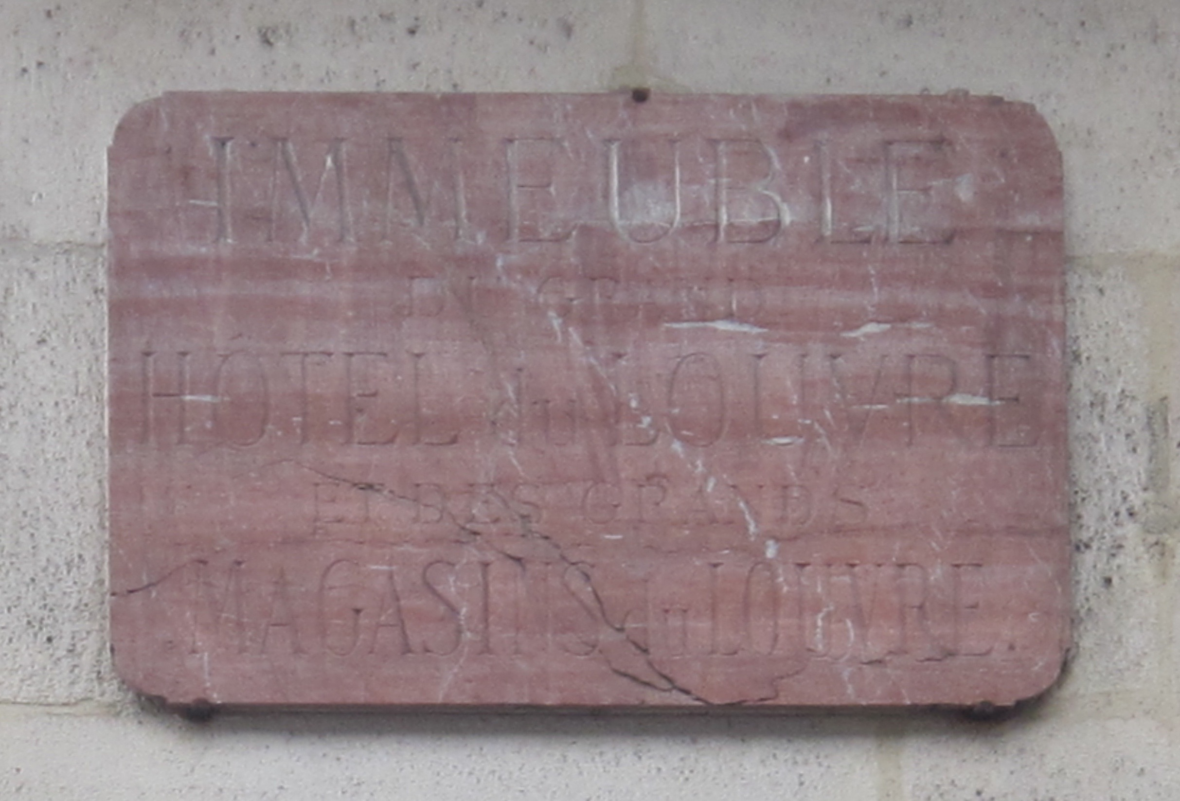 Plaque au n°91 rue de Rivoli rappelant l'existence des Grands Magasins du Louvre.